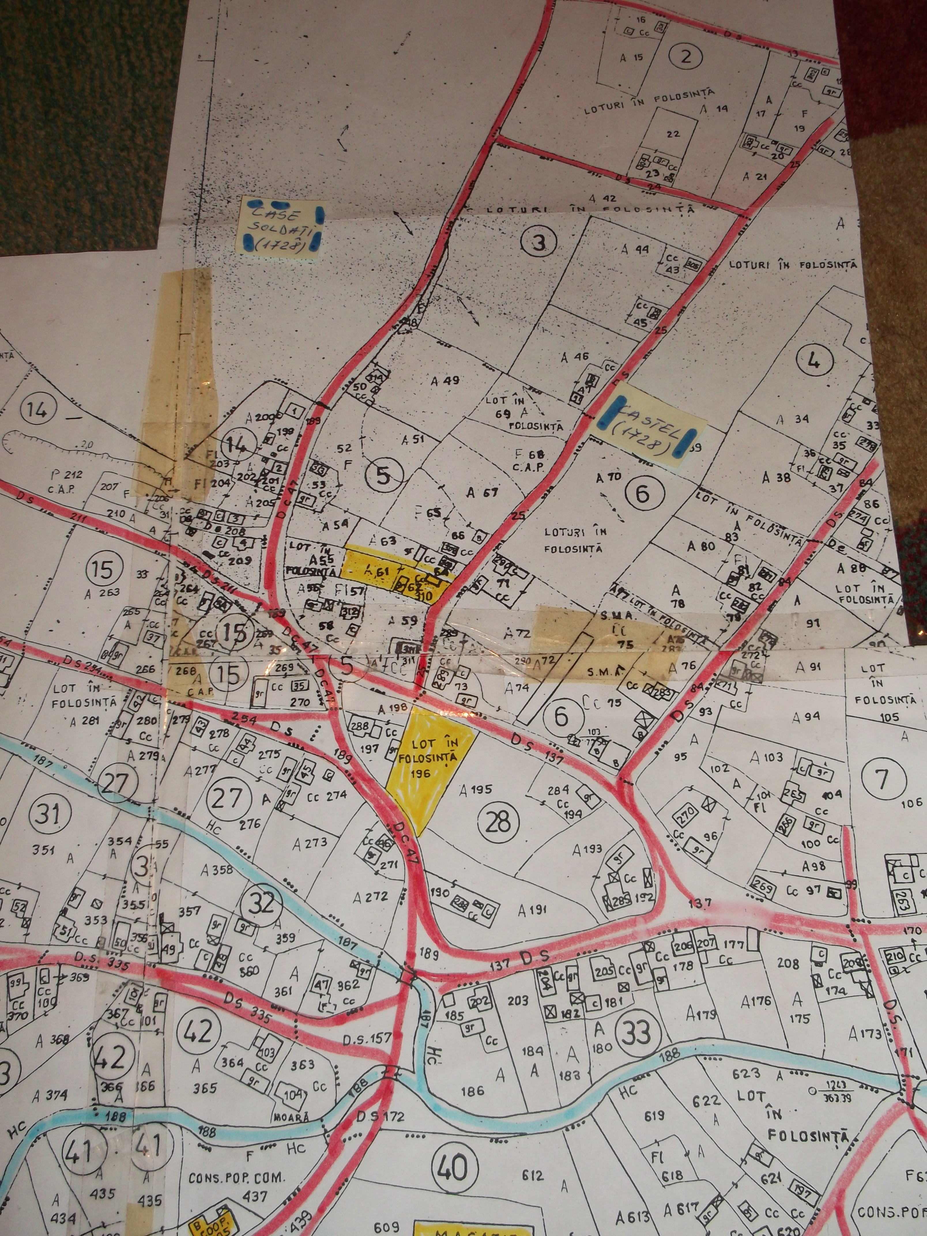 Harta topografica cu amplasamentul Castelului din Aruncuta , construit in anul 1728 , respectiv Casa soldatilor si temnita - in partea de nord - est si nord - vest .